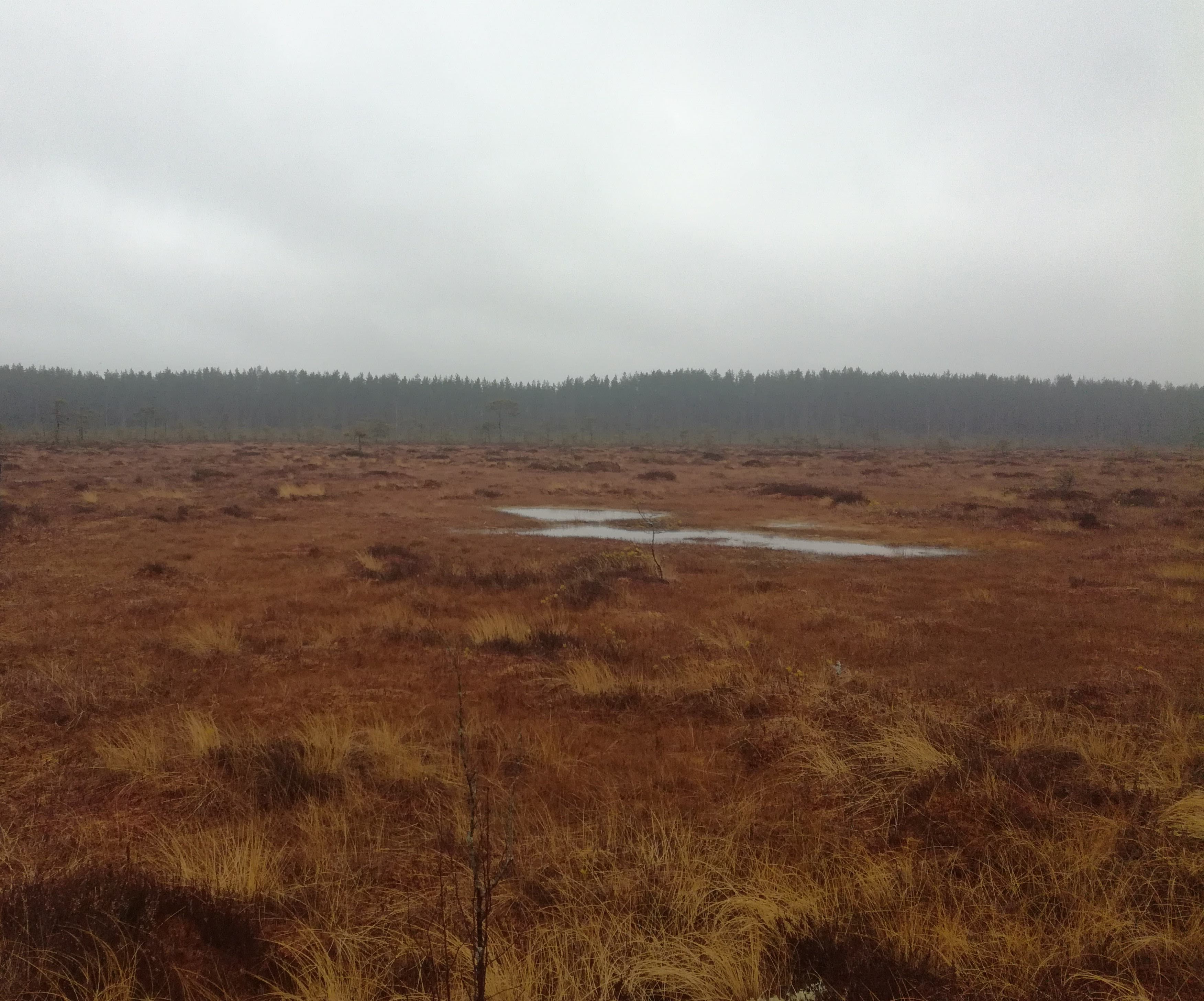 Punassuon keidassuon keskiosaa Teijon kansallispuistossa